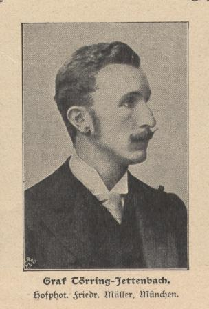 Hans Veit zu Toerring-Jettenbach (1862-1929), bayerischer Adeliger, Schwiegersohn von Herzog Carl Theodor in Bayern